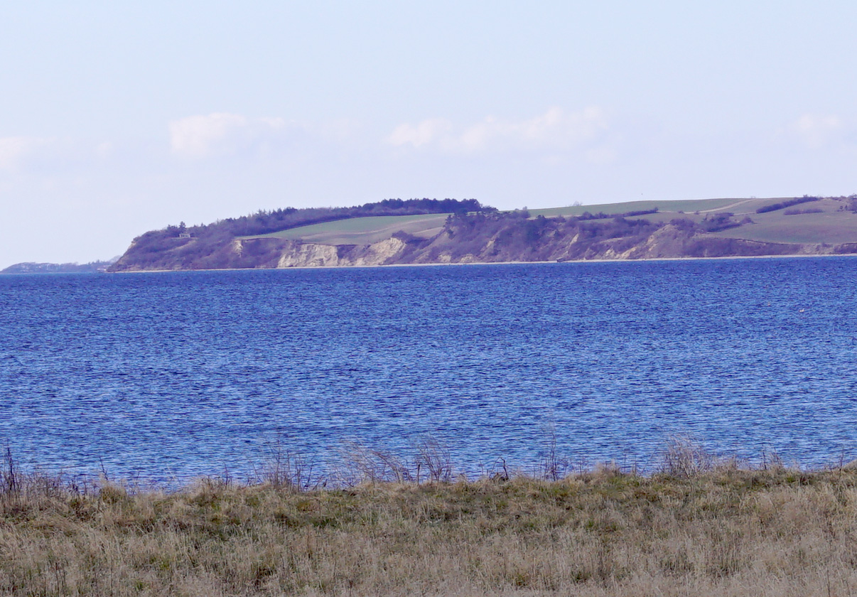 Sønderby Klint set fra syd